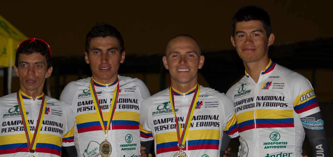 Podio persecución por equipos Campeonato Nacional de Pista 2013 Velódromo Martín Emilio Cochise (Medellín) Jueves 17 de octubre de 2013